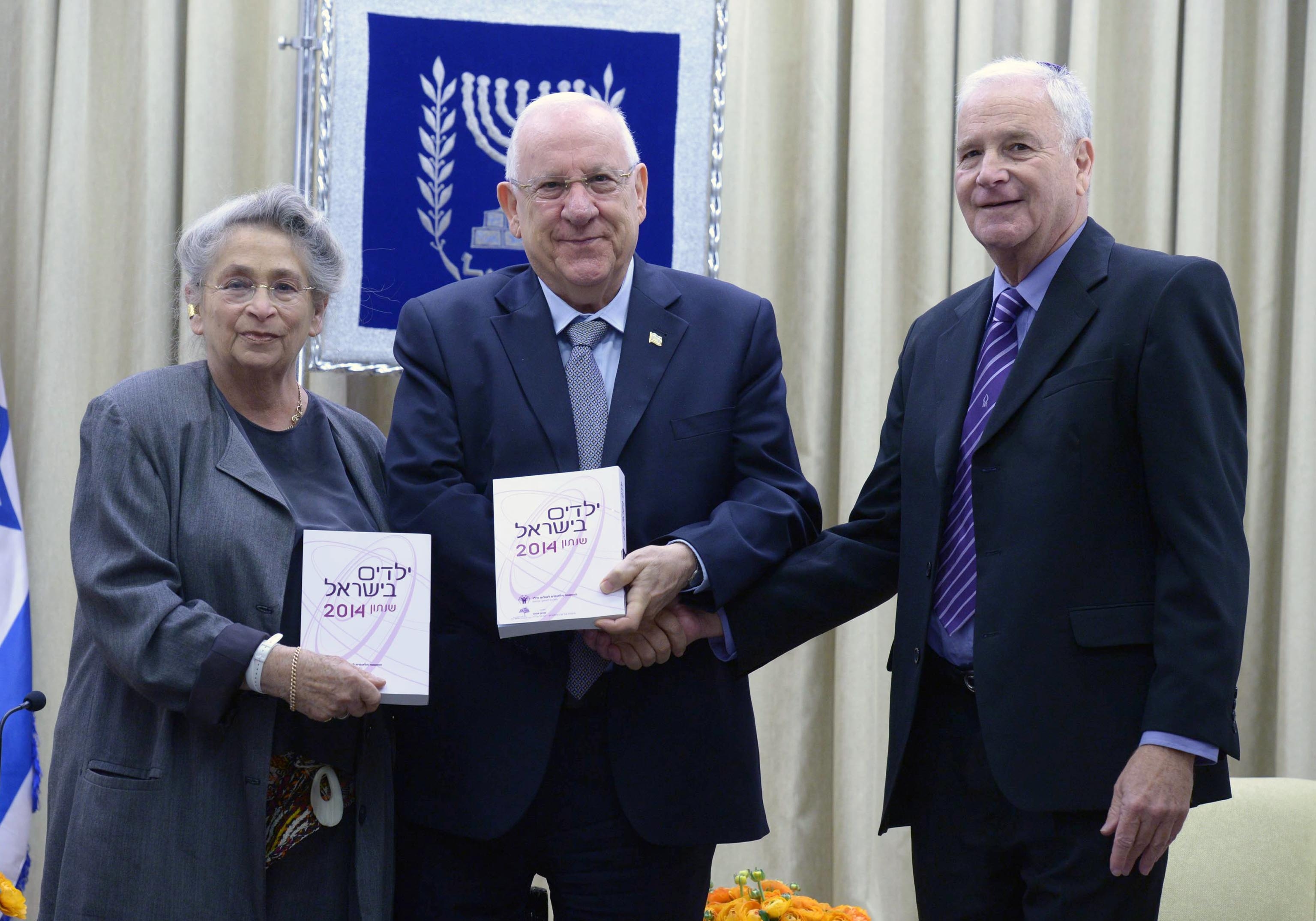 יצחק קדמן המייסד ומנכ"ל המועצה הלאומית לשלום הילד, עם נשאי המדינה ראובן ריבלין ורעייתו נחמה בטקס הגשת השנתון הסטטיסטי של המועצה לשלום הילד לשנת 2014 יצחק קדמן מימין.